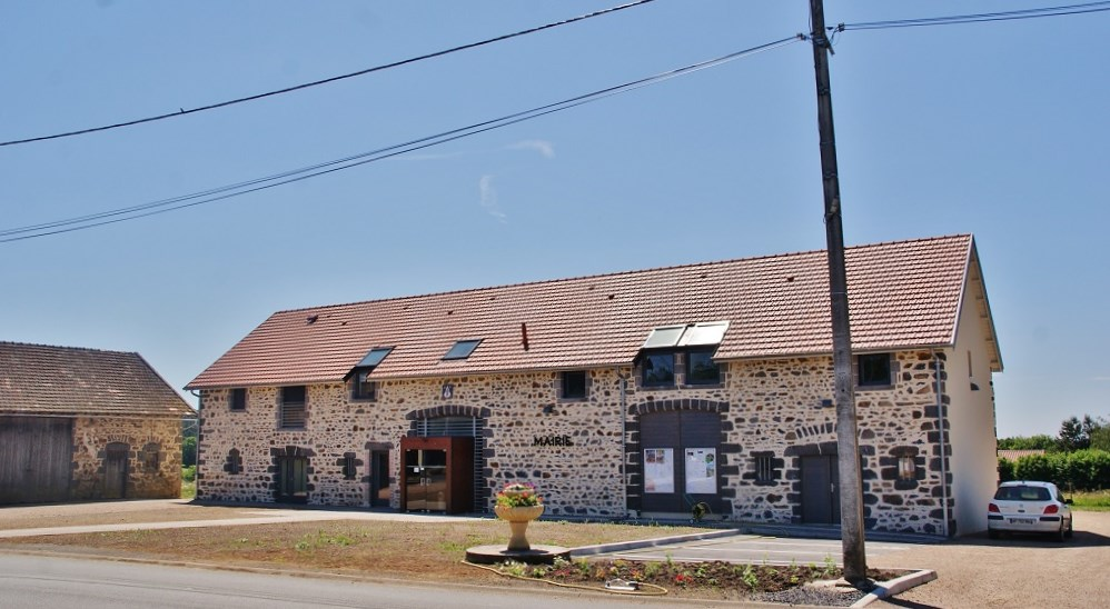 La Mairie